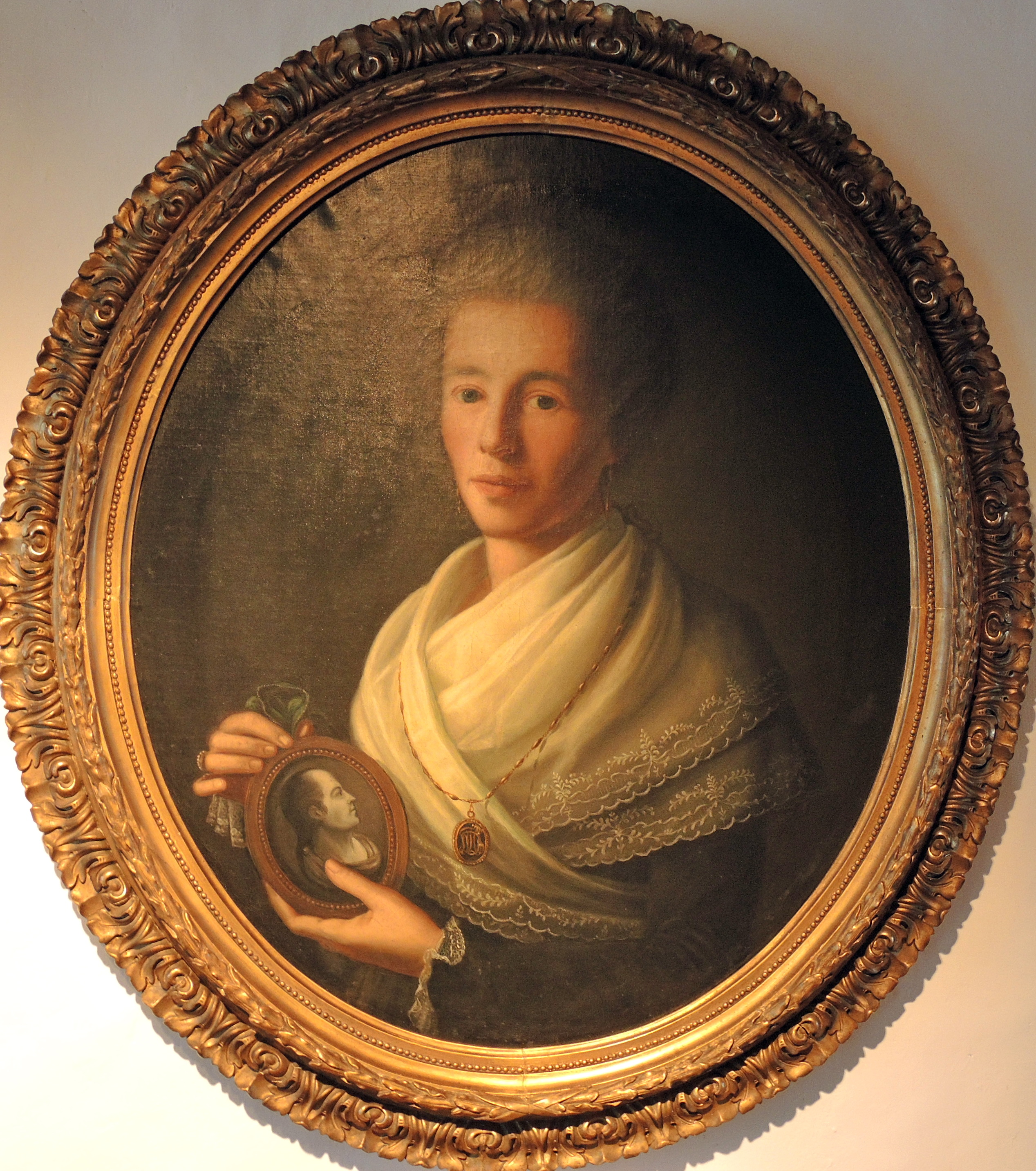 Das 2010/2012 runderneuerte Stadtmuseum in Rapperswil (SG) und seine Sammlung: M. Anna Elsa Franziska (Lisette) Diogg-Curti (1772-1849), Gattin des Malers, Öl auf Leinwand, um 1815, Felix Maria Diogg